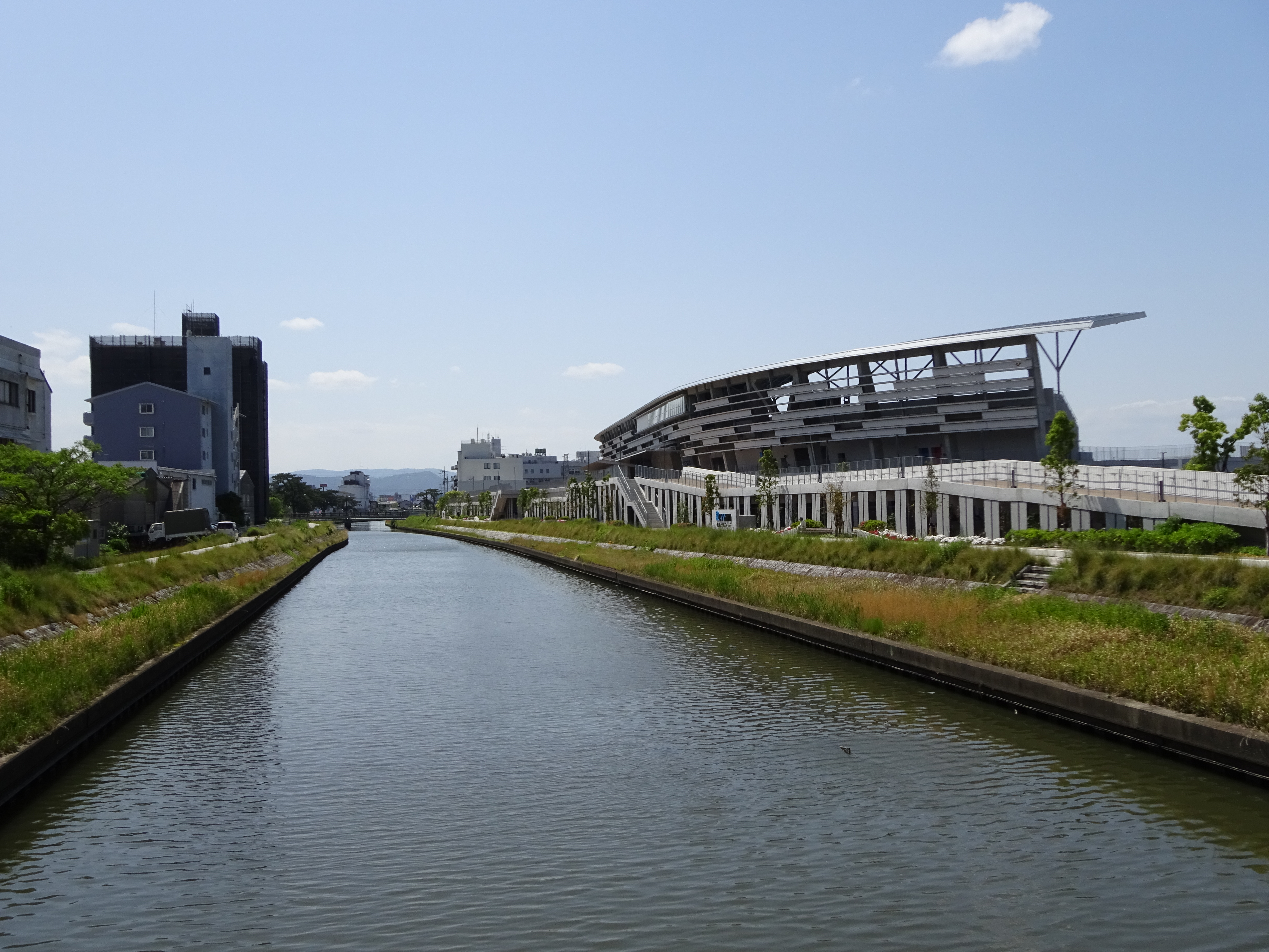 相引川（屋島）の学校橋で西方を望む